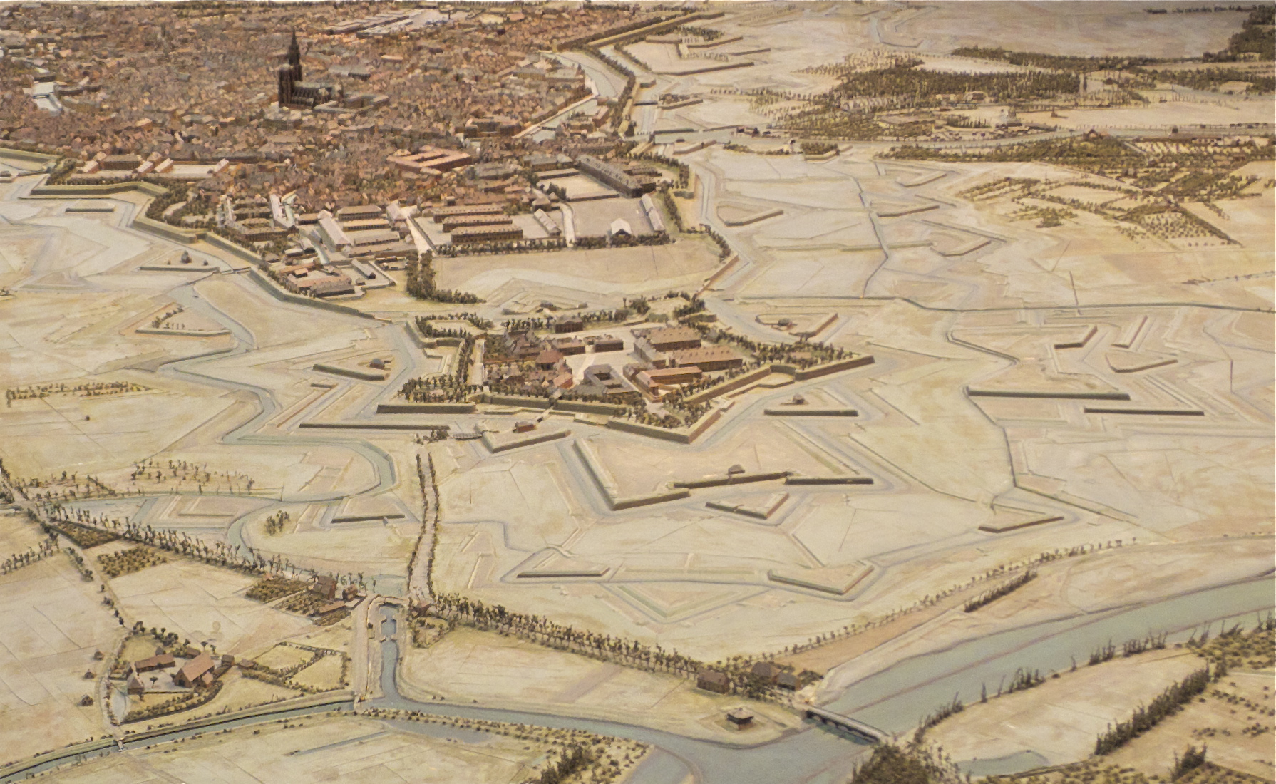 Plan-relief de la citadelle de Strasbourg en 1863. Plan-relief construit de 1830 à 1836 sous la direction de Boitard et actualisé de 1852 à 1863. Échelle 1/600e